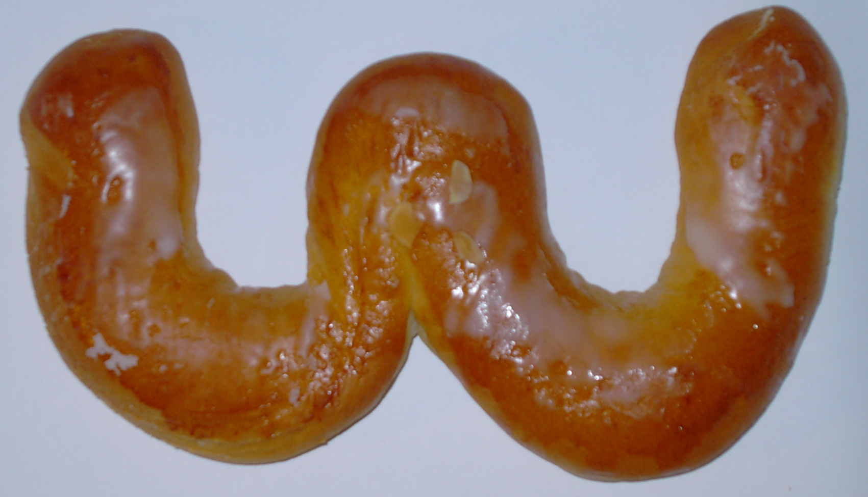 Bild eines Horraffen der zum Crailsheimer Stadtfeiertag im Jahr 2006 gebacken wurde. Der Horraff ist ein traditionelles Gebäck anläßlich des Stadtfeiertages.